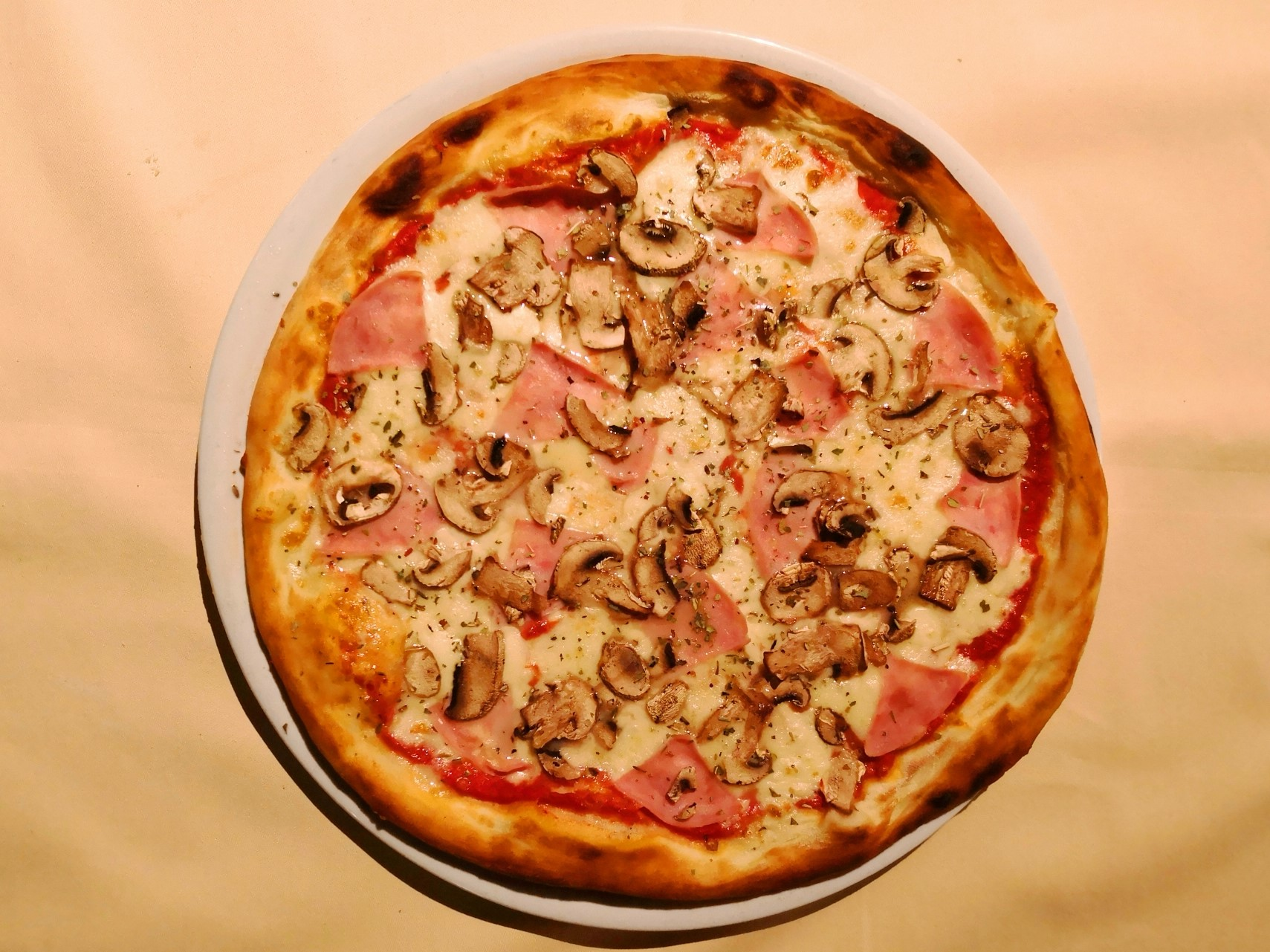 Состав: домат, моцарела, шунка, печурки.